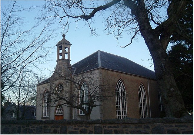 Echt church, Aberdeenshire, built 1804